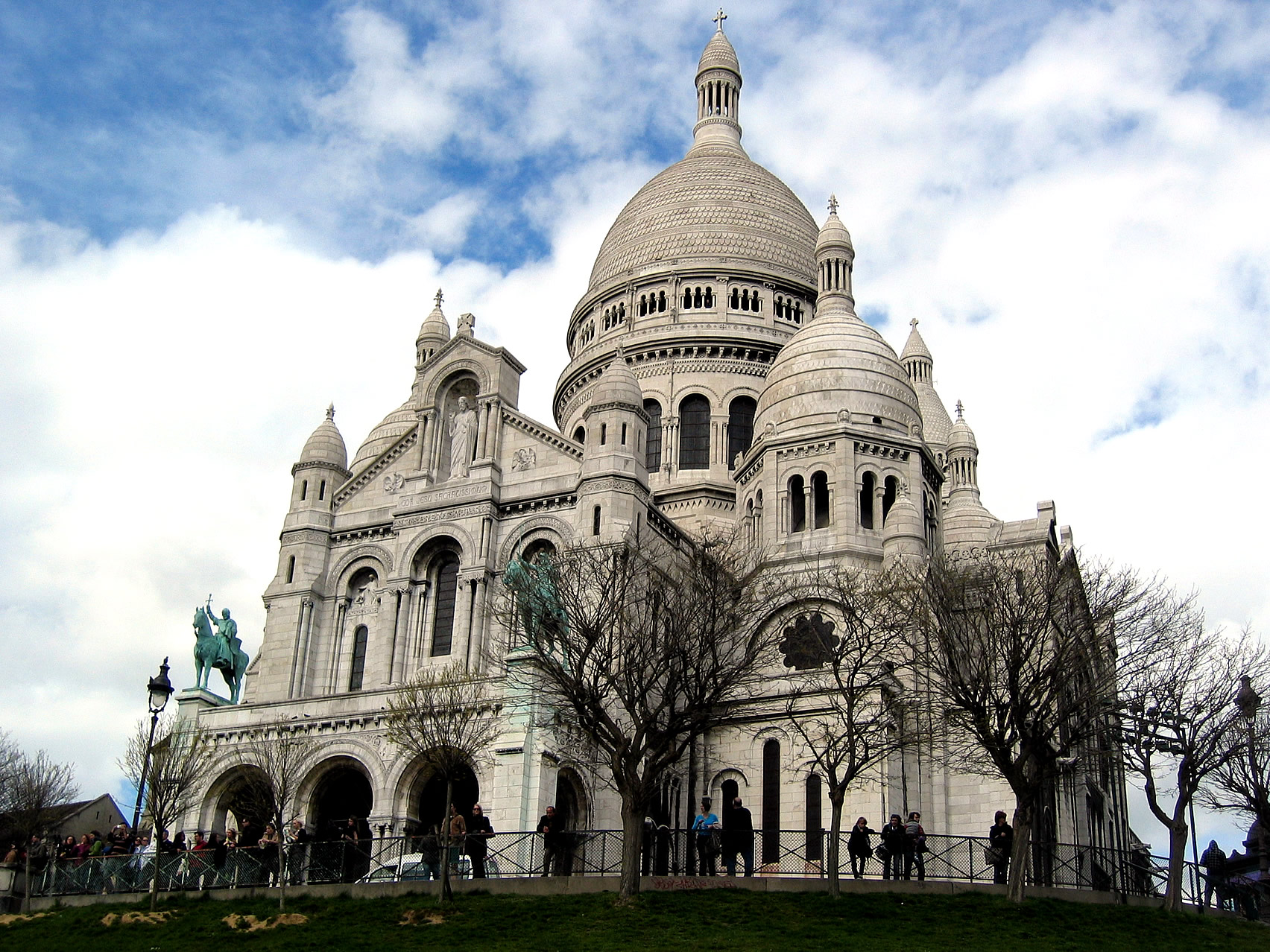 Basilique du Sacré-Cœur in Paris / Basilika vom Heiligen Herzen in Paris / Basilique du Sacré-Cœur en Paris 2008